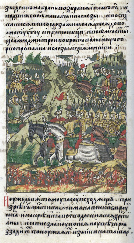 Князь Владимир Андреевич и Боброк Волынец в засаде. Лицевой летописный свод на брань, возбраняет нам Господь». И подвигнул всех на плач и на слезы, и заплакали все, со слезами молясь довольно Господу Богу, и Пречистей Богородице, и всем святым. И сам Дмитрий Боброк Волынец горько заплакал и слезы излил многие. И уже девятый час кончался, призрел Господь милостивыми очами на всех князей русских, и на крепких воевод, и на всех христиан. И тут внезапно задул ветер сзади их, понуждая их выйти на татар. [Тогда Дмитрий Боброк сказал князю Владимиру Андреевичу: «Господине княже, час пришел, время приблизилось». Также и ко всему воинству сказал: «Господа, и отцы, и братья, и чада, и друзья! Поднимайтесь, время нам благое пришло. Ибо сила Святого Духа помогает нам». И так все дошли с яростью и ревностью божественною на неверных и противных врагов, и не устрашились христиане, дерзнули, как великие ратники.]